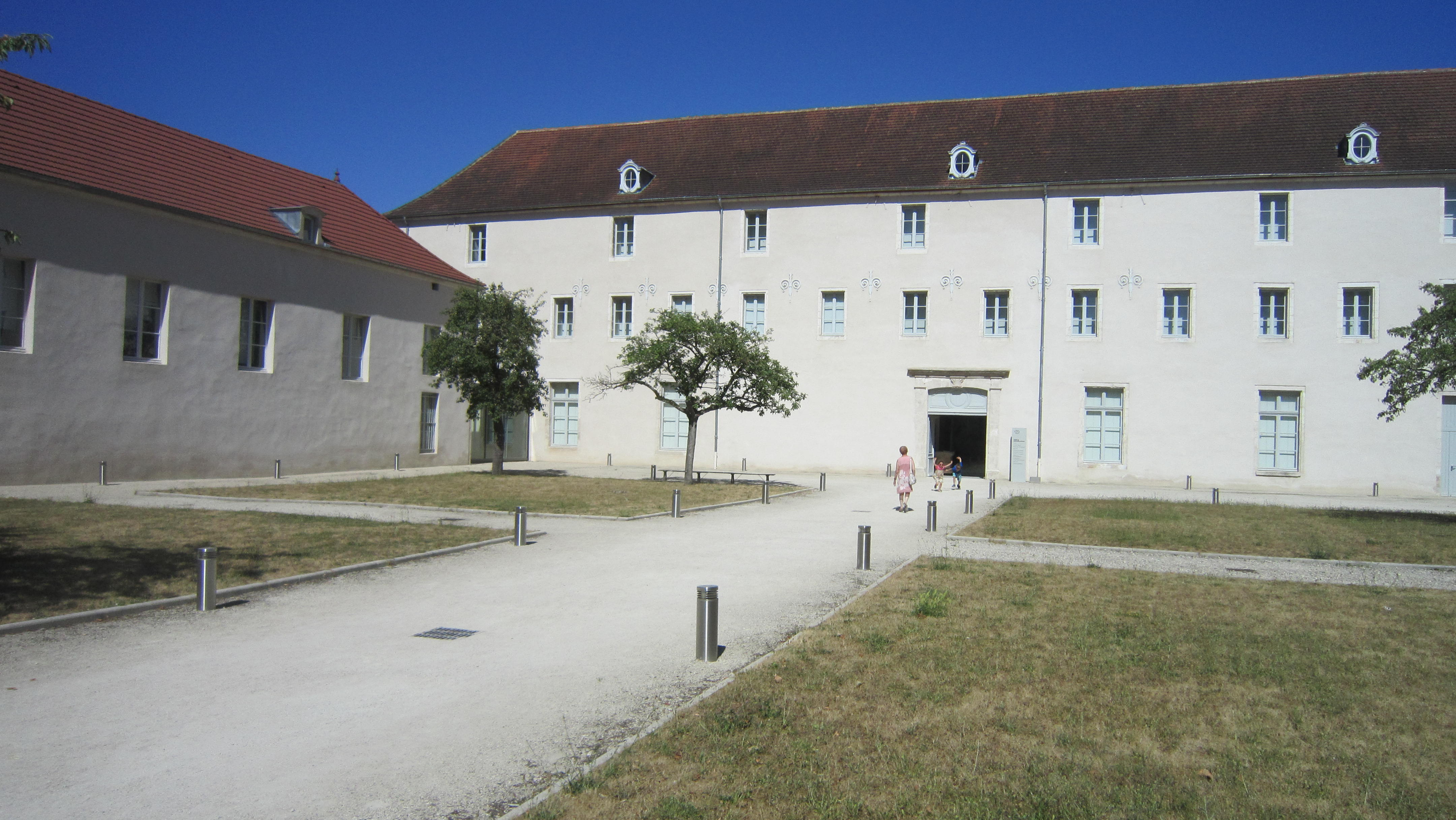 Façade de l'ancienne abbaye Notre-Dame de Châtillon-sur-Seine, actuel musée du Pays Châtillonnais